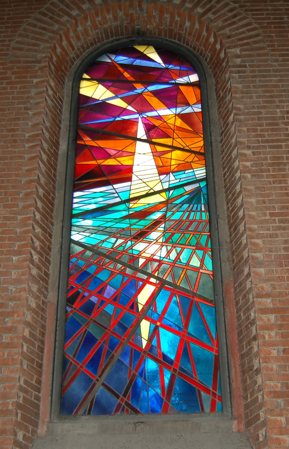 Nave di sant'Antonio che lo condusse in Sicilia - Vetrata policromatica di Vittorio Cecchi - Chiesa Sant'Antonio in Terni